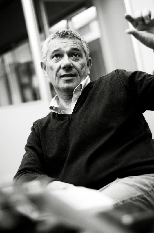 Il giornalista Attilio Bolzoni